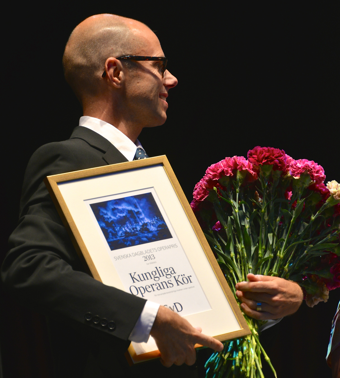 Olof Lilja tar emot Svenska Dagbladets operapris för 2013 som går till Kungliga Operans kör. Gustav Adolfs torg i Stockholms den 17 augusti 2013.